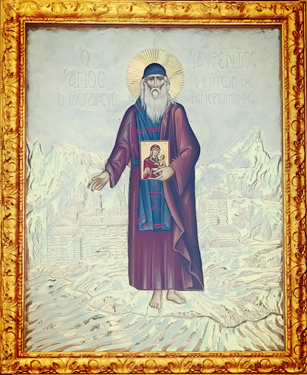 Ο Κτίτωρας της μονής Φανερωμένης Σαλαμίνας